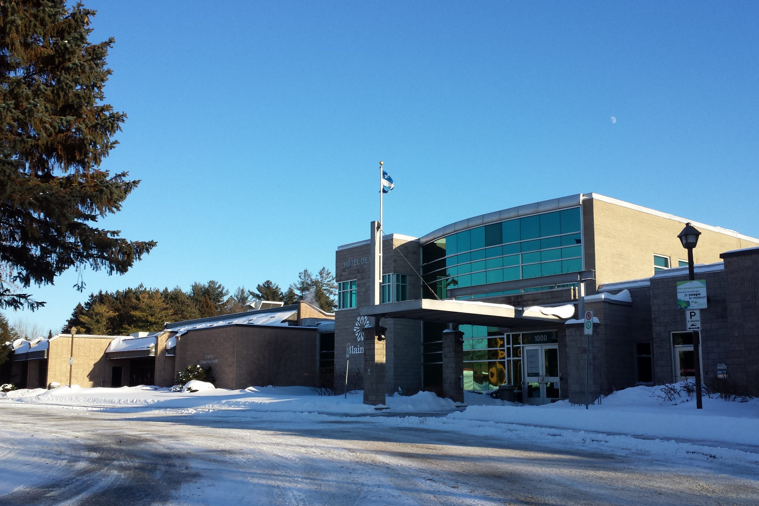 Blainville, Quebec, Canada